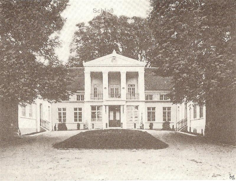 Pałac w Tychowie przed II wojną